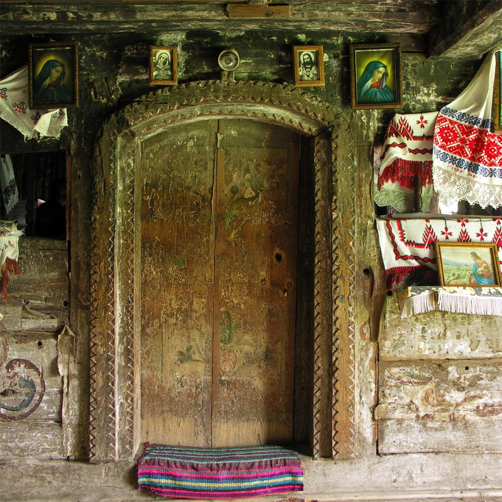 Biserica de lemn din Bălan Josani, portalul interior, spre navă.